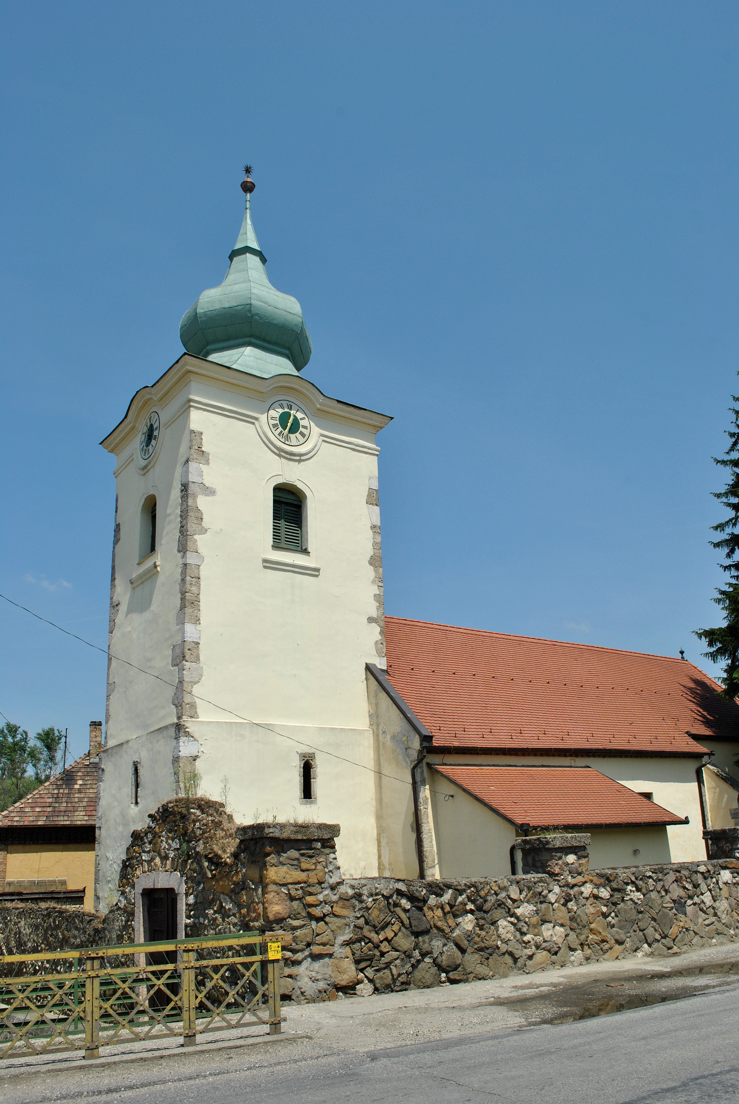 Ref.templom (Neszmély, Fő utca, Templom köz) This is a photo of a monument in Hungary. Identifier: 6342